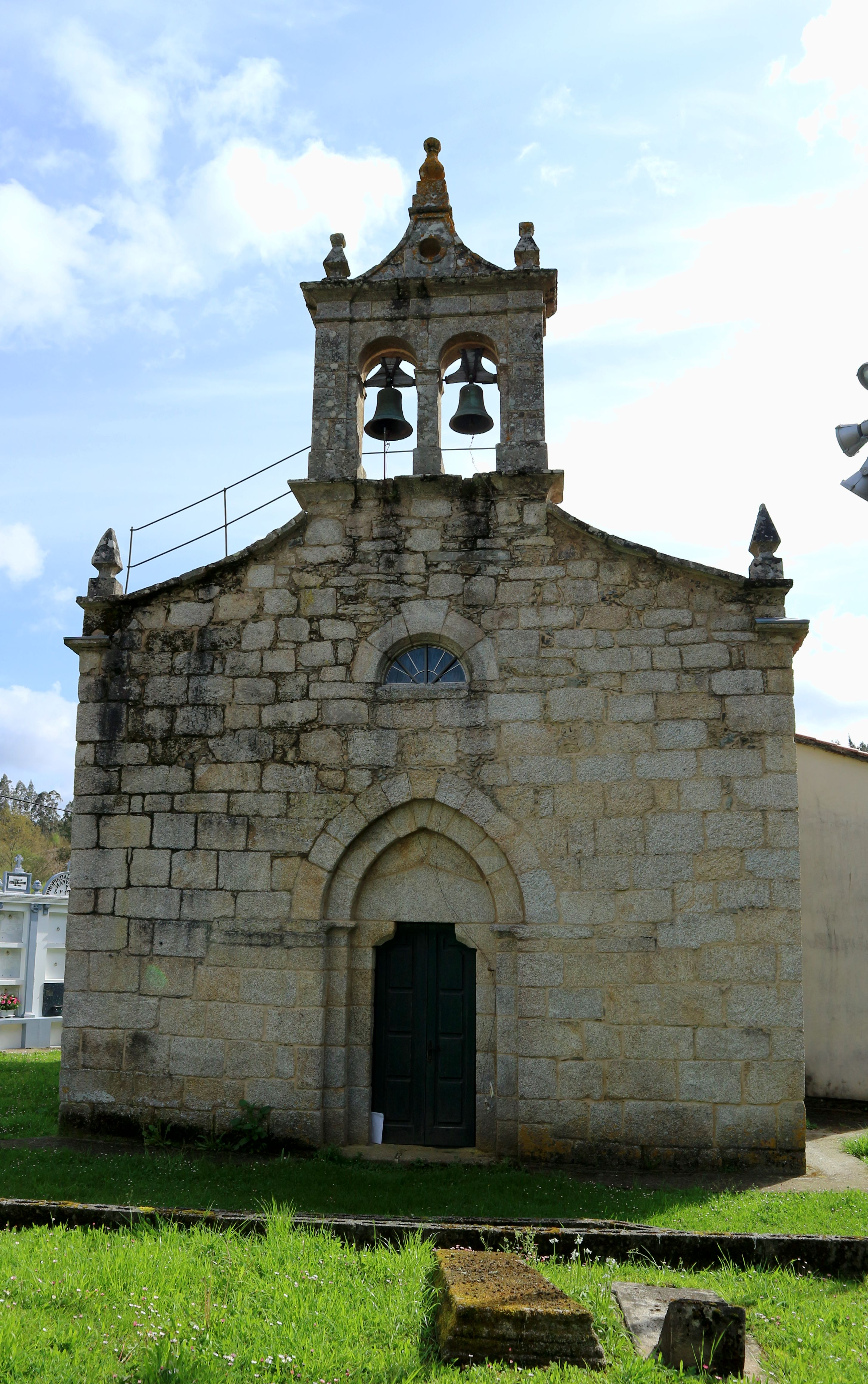 Igrexa de San María de Cuíña. Cuíña, Oza-Cesuras.